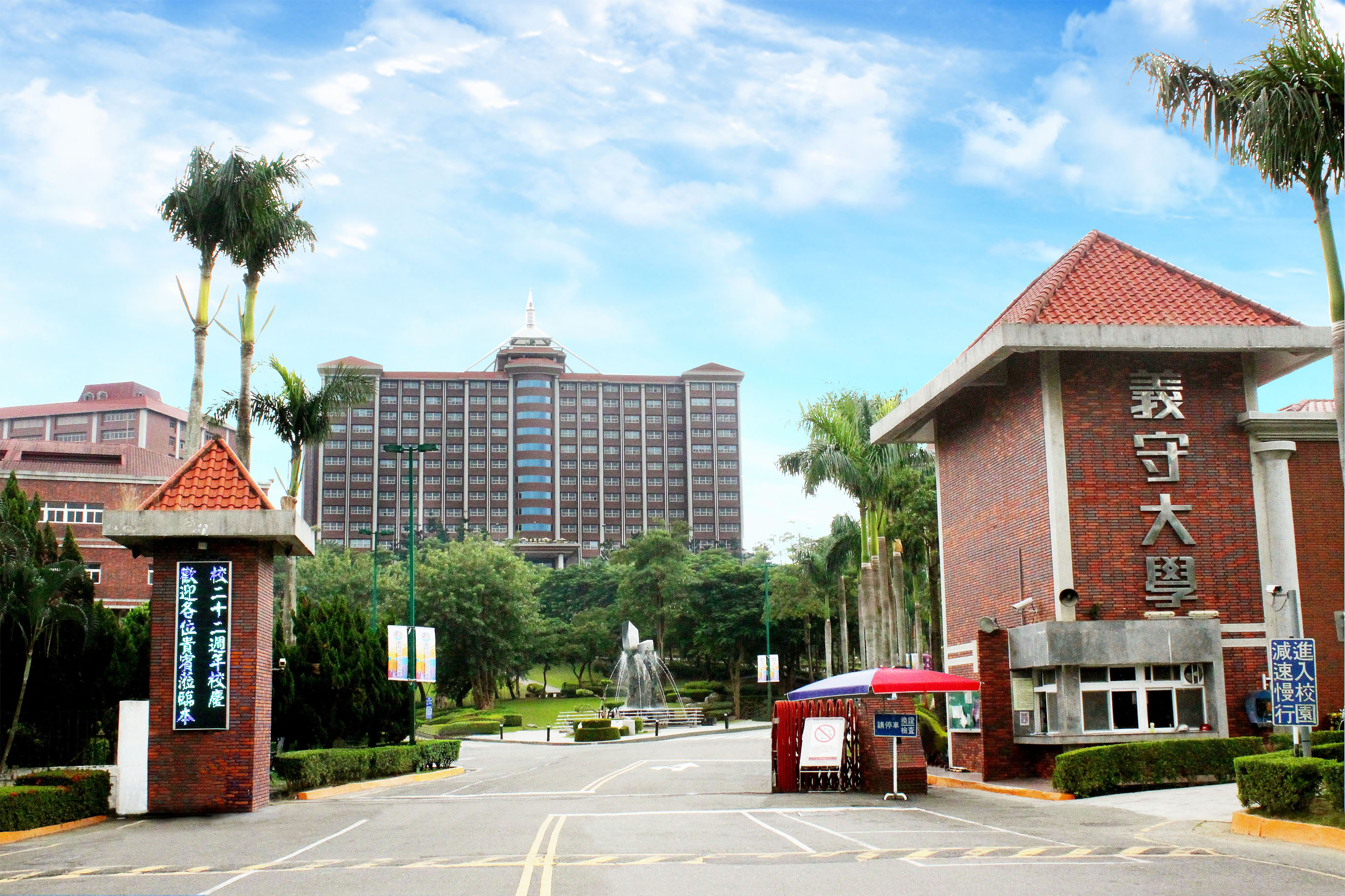 攝於義守大學22週年校慶